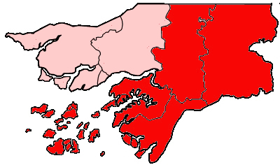 Mappa della diocesi cattolica di Bafatà, in Guinea Bissau.